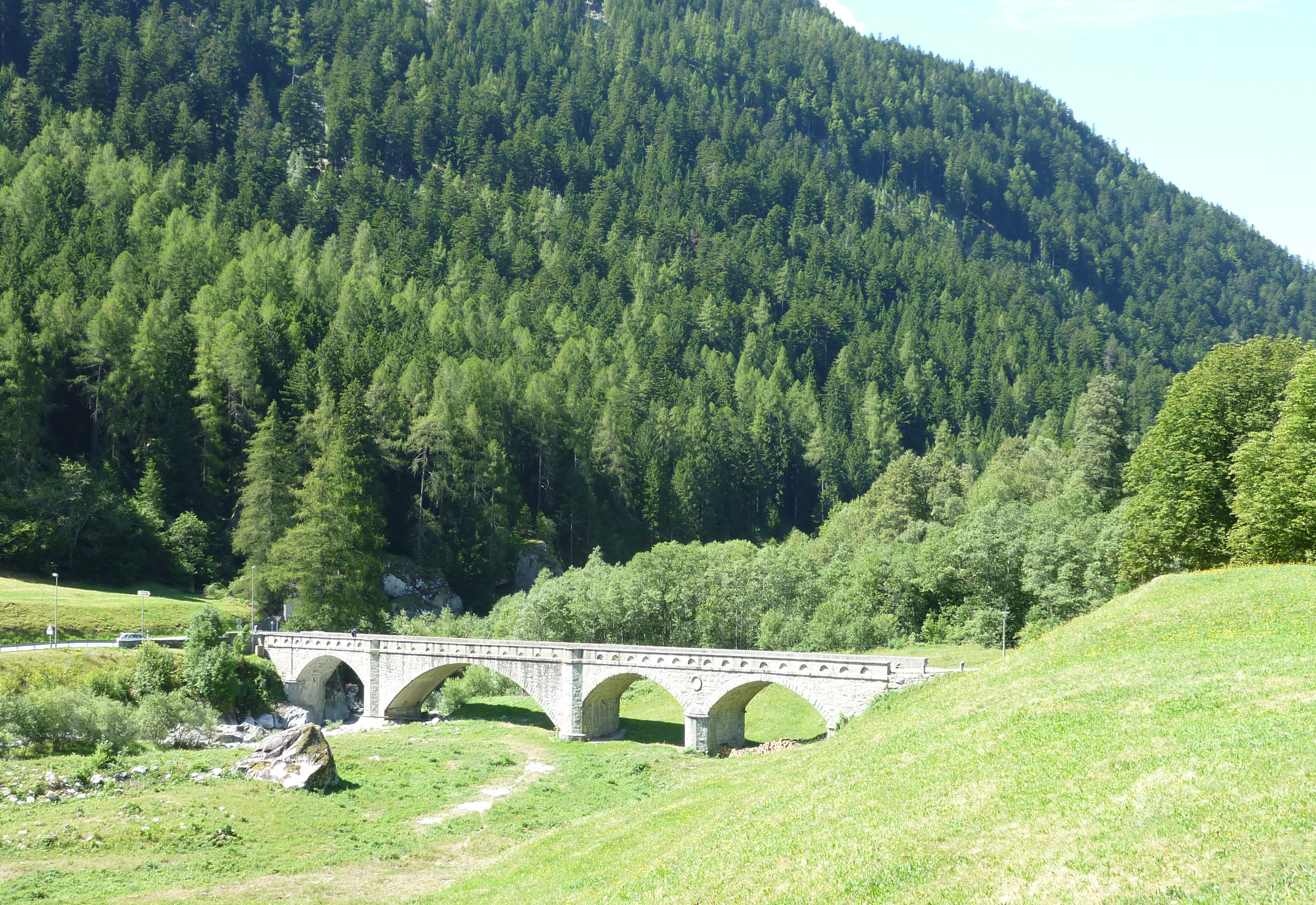 Brücke zum Palazzo Castelmur